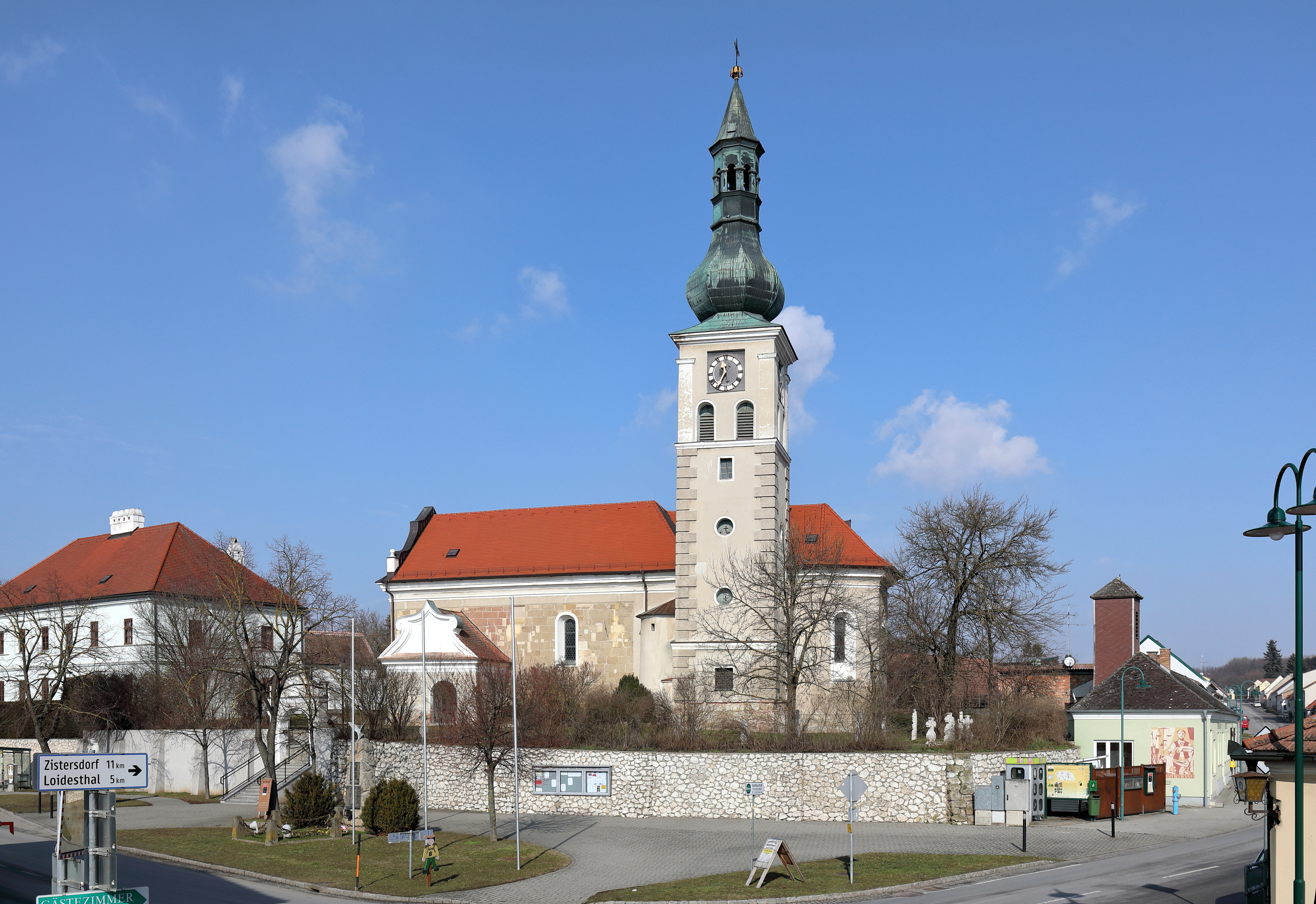 Ortszentrum von Niedersulz, ein Ortsteil der niederösterreichischen Marktgemeinde Sulz im Weinviertel. Im Zentrum die Pfarrkirche und ganz links der Pfarrhof.